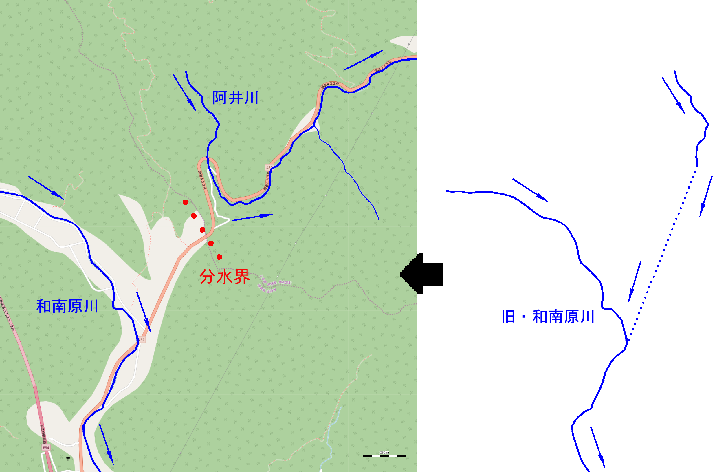 島根県を流れる阿井川が広島県を流れる和南原川を河川争奪した状況を図示 This map may be incomplete, and may contain errors. Don't rely solely on it for navigation.